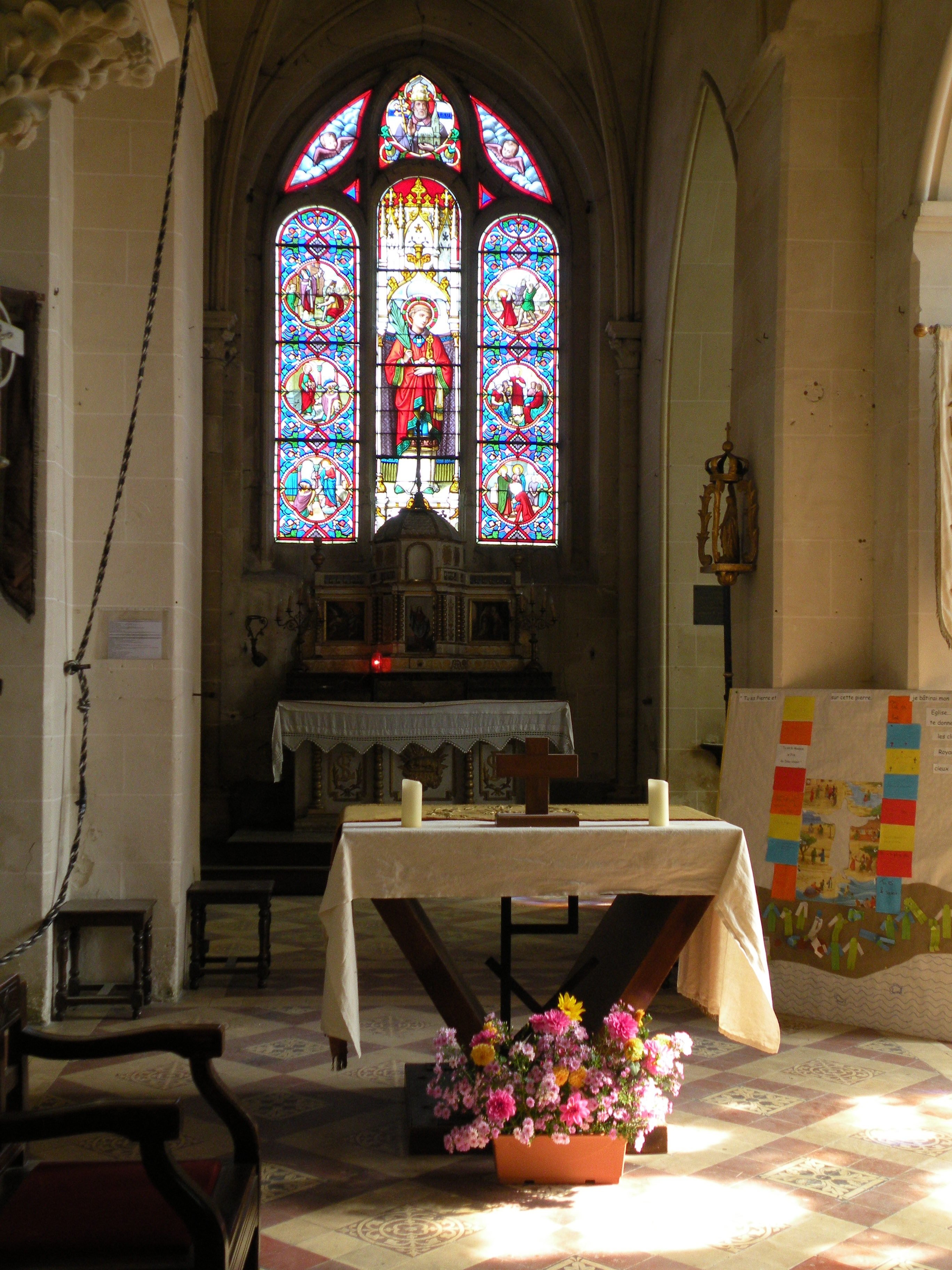 Église Saint-Étienne Bouconvillers : Le chœur au chevet plat, datant en principe du second quart du XIIe siècle, mais éclairé par une baie en tiers-point flamboyant tardif du XVIe siècle, et ayant perdu ses murs latéraux avec la construction des deux chapelles.